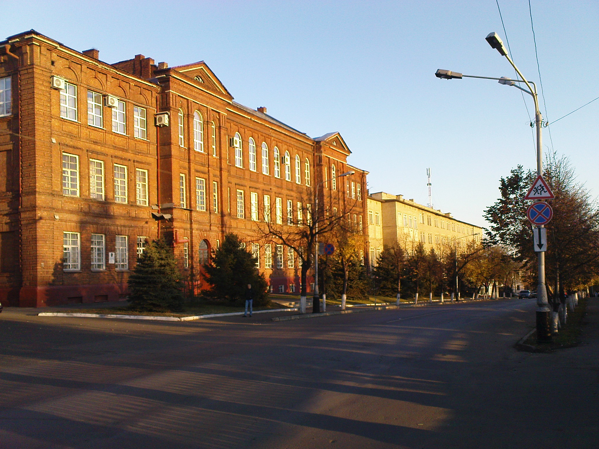 фото Мичуринского ГАУ со стороны улицы Интернациональной